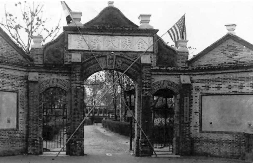 金陵大学堂干河沿校门。